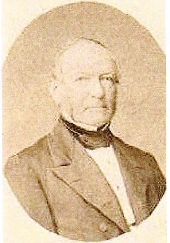 Scan eines Familienfotos